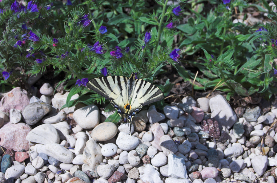 Flora e fauna sulle sponde del lago di Garda